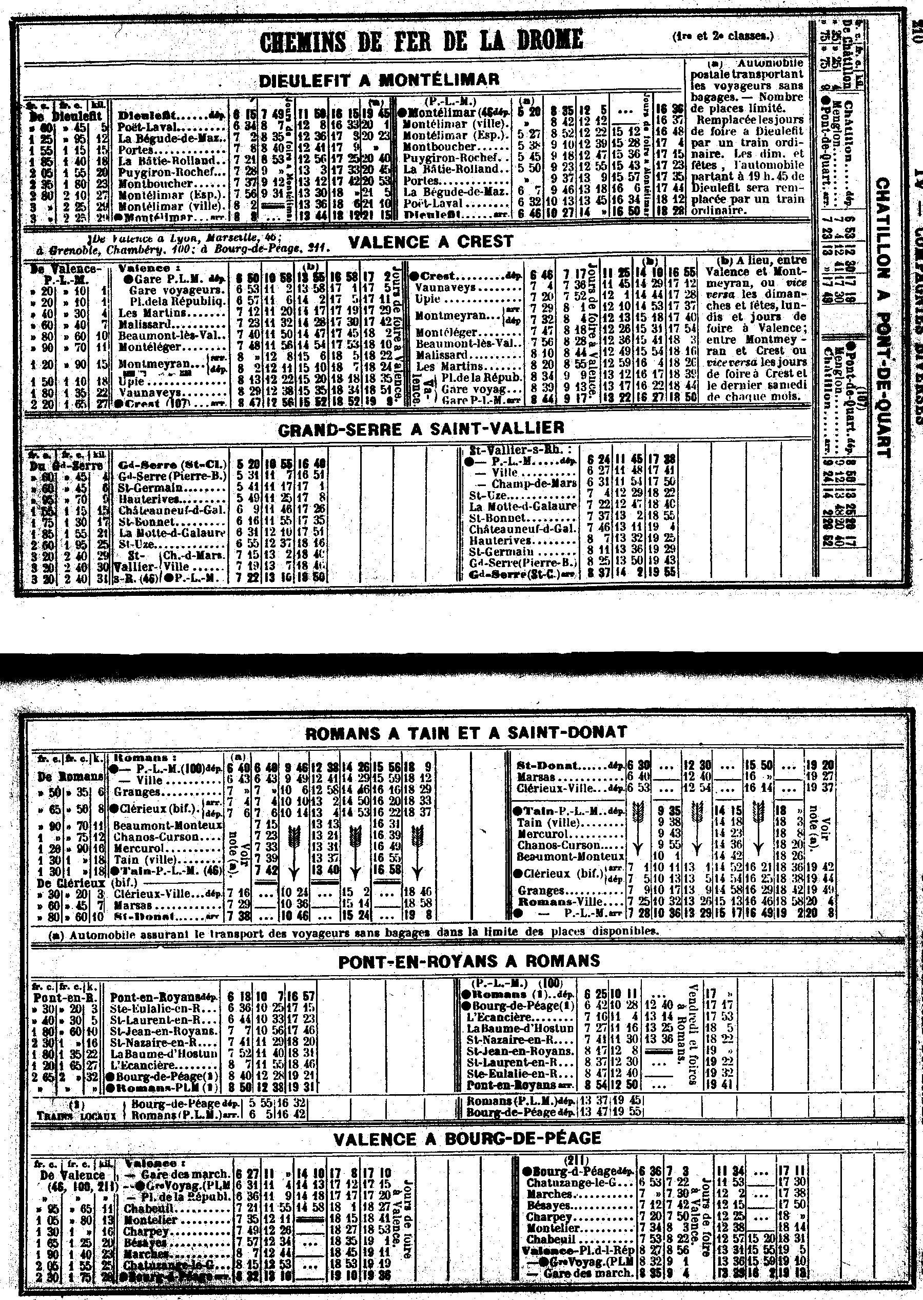 Horaires des lignes des Chemins de fer de la Drôme - Mai 1914